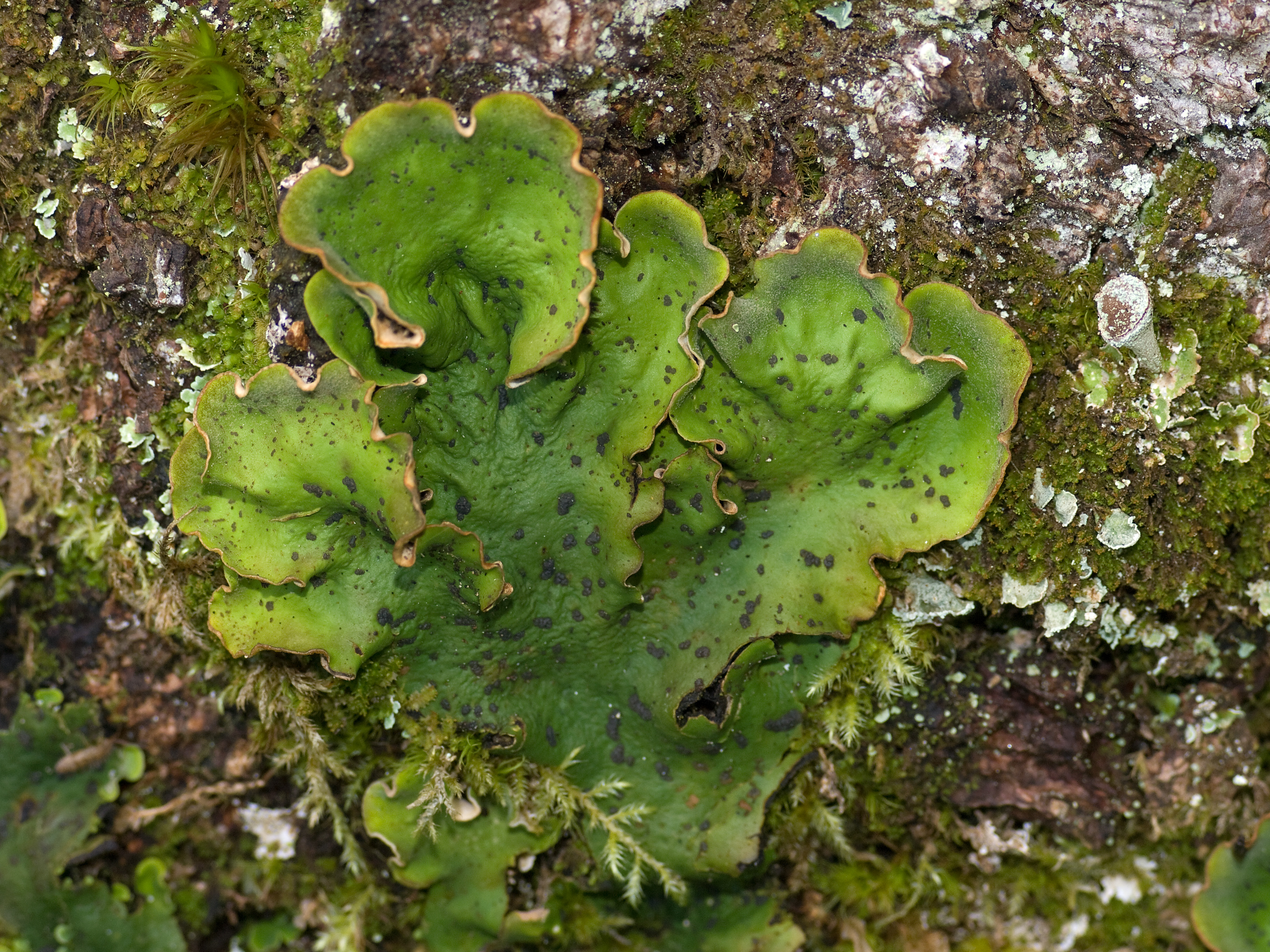 Apfelflechte Peltigera aphtosa, picture taken near Mittenwald/Bavaria Apfelflechte Peltigera aphtosa, aufgenommen nahe Mittenwald, Bayern